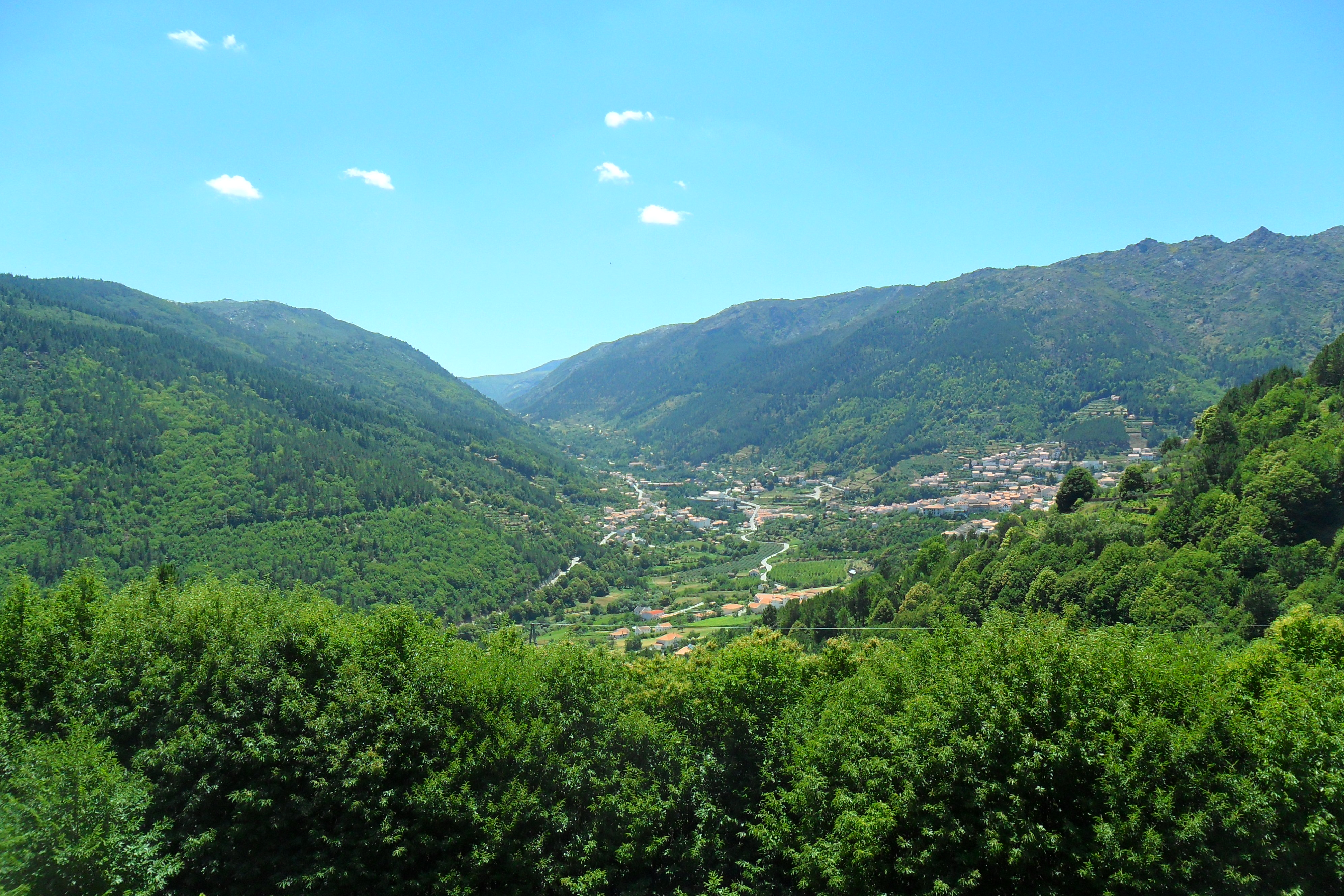 Vista Panorâmica de Manteigas This is a photography of a Site of Community Importance in Portugal with the ID: PTCON0014. Natura2000 entry, EEA entry